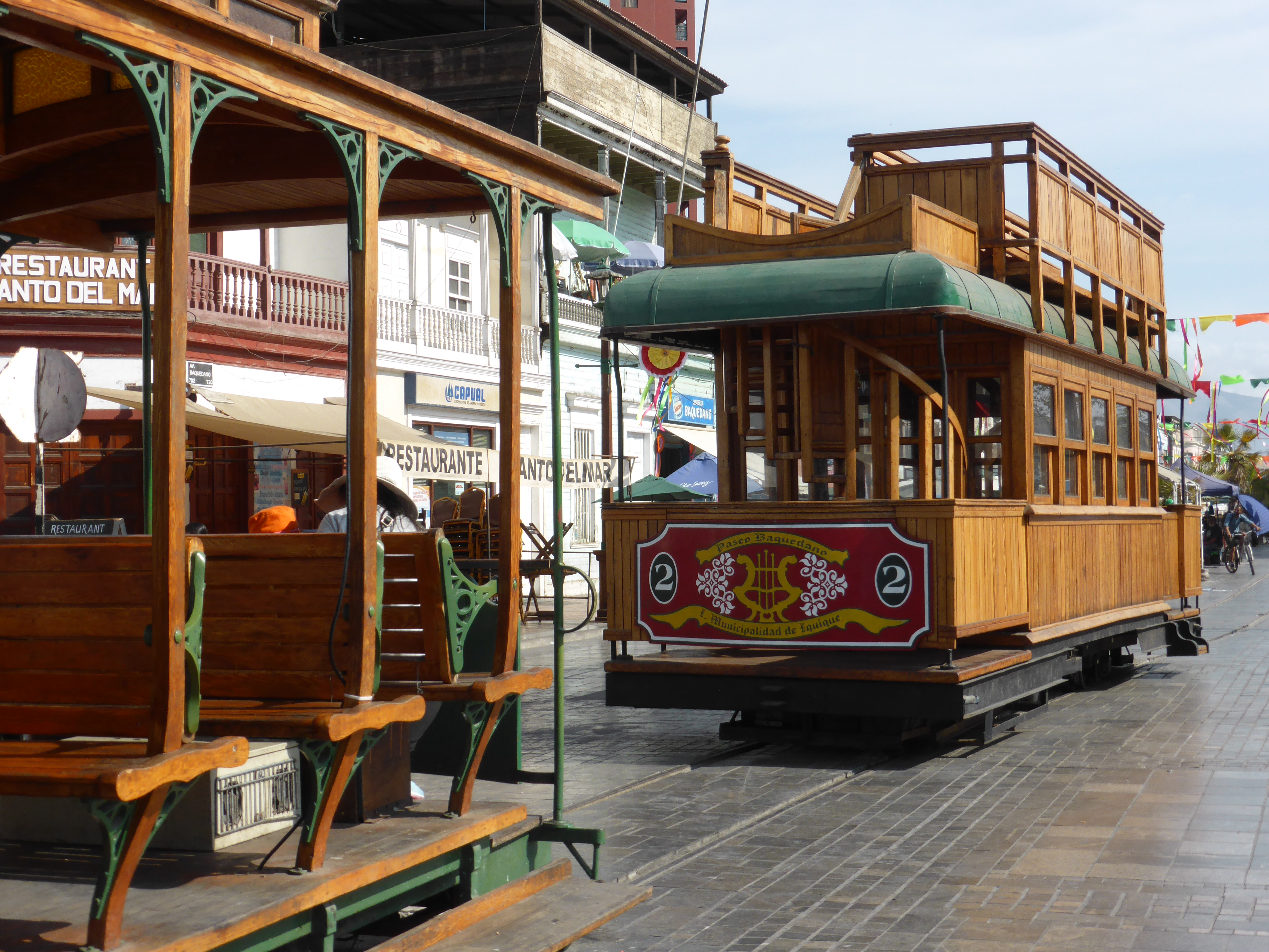 En el Paseo Baquedano, con Plaza Arturo Prat, se encuentran estos dos tranvías, que efectúan viajes turísticos. Vía de trocha métrica (vía de 1000 mm). Paseo que ofrece la Municipalidad de Iquique, con el nuevo tranvía que funciona a baterías.